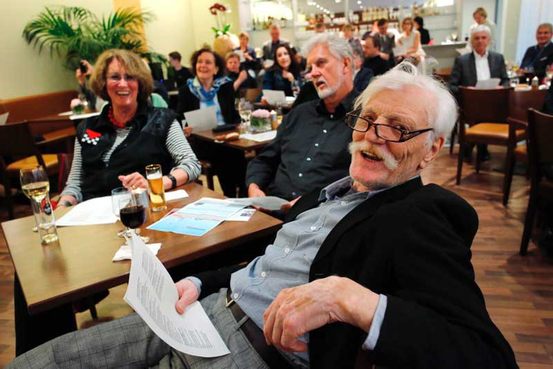 Friedel Drautzburg bei einem Westwind-Literaturabend